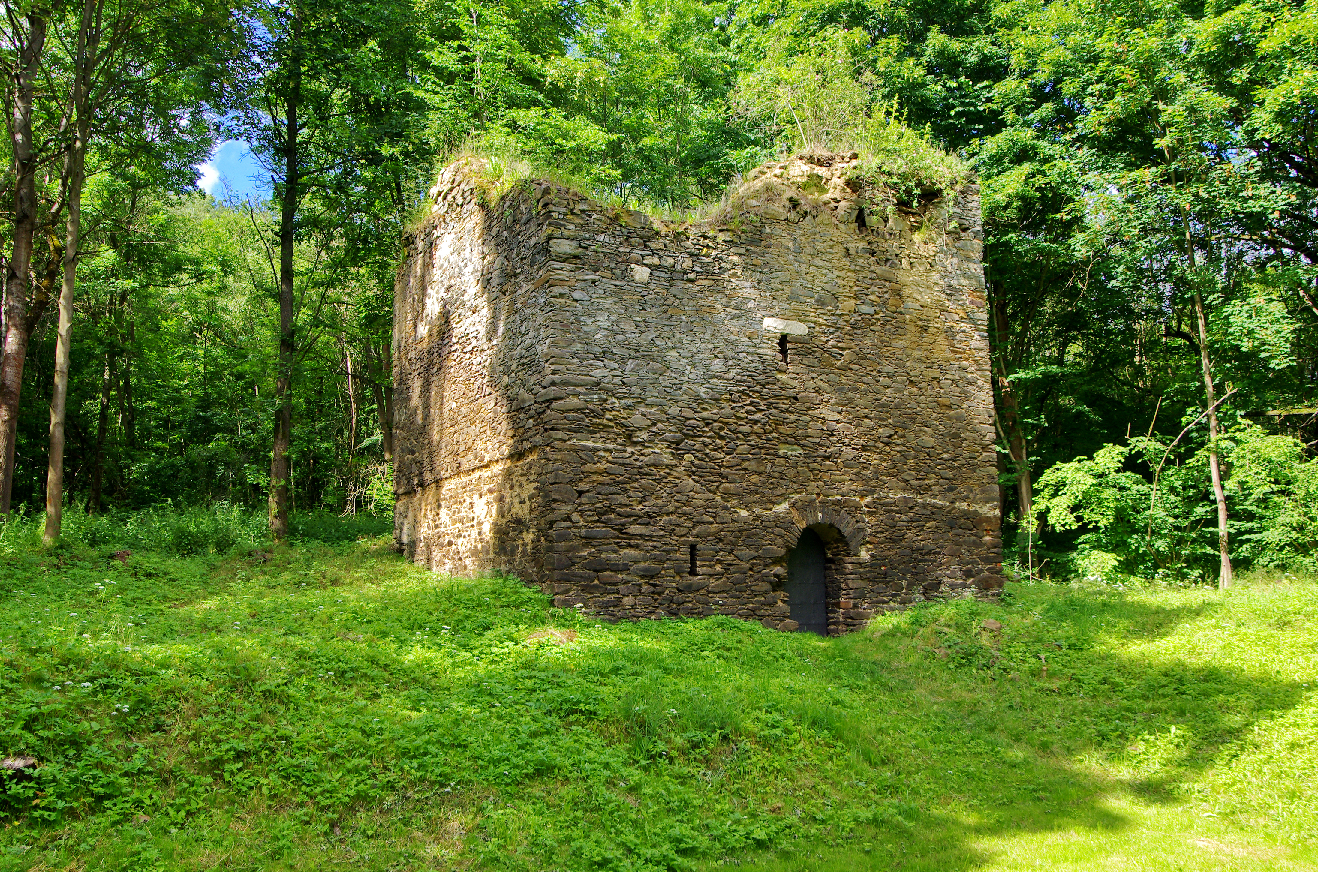 Tvrz, na západním břehu přehrady Skalka, Pomezná.